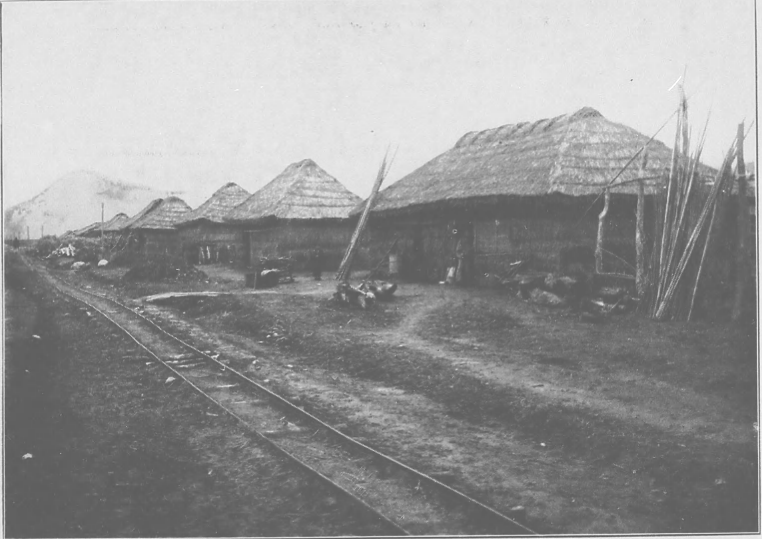 吳全城賀田組農場